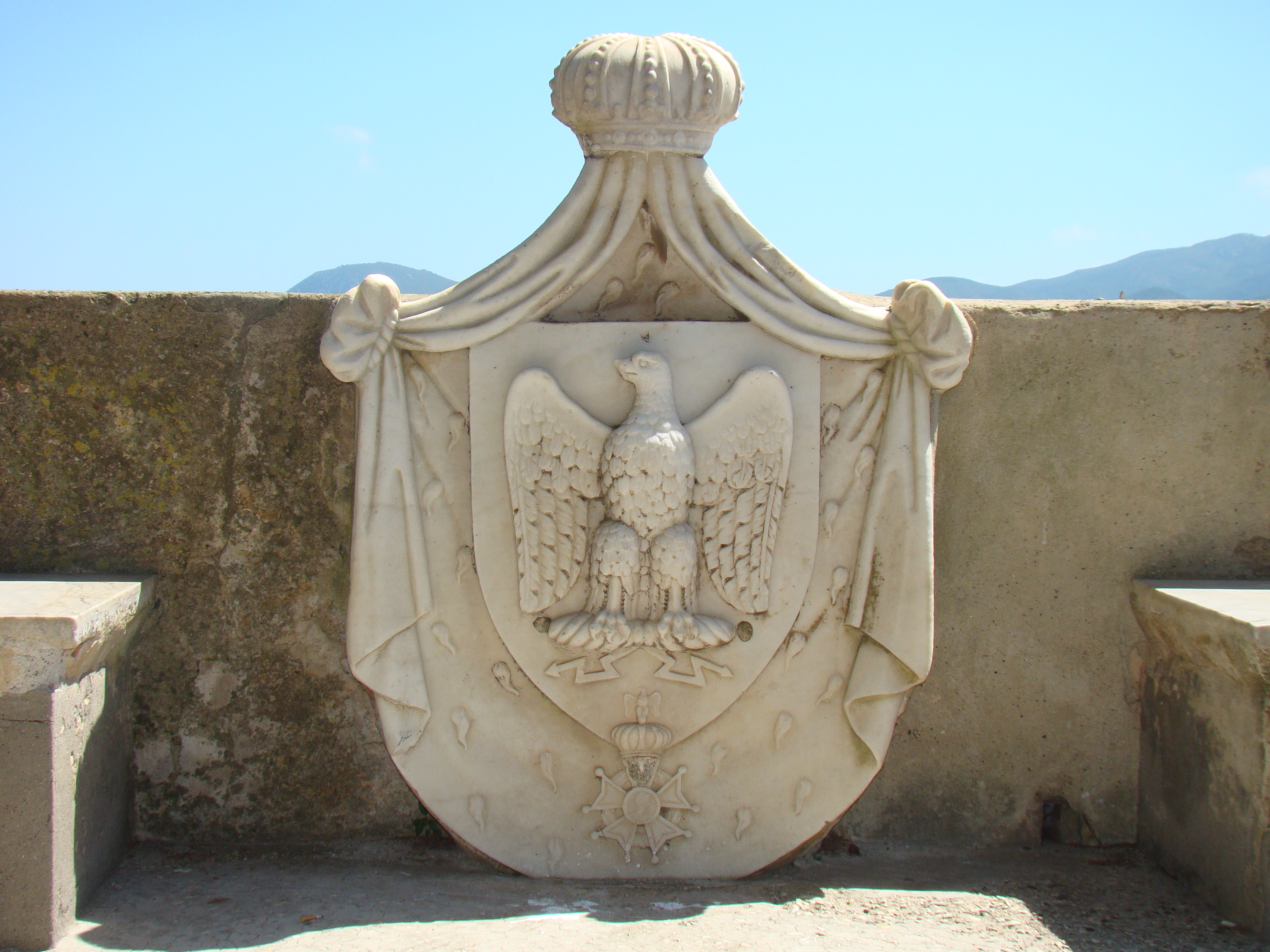 Stemma napoleonico, palazzina dei Mulini, Portoferraio